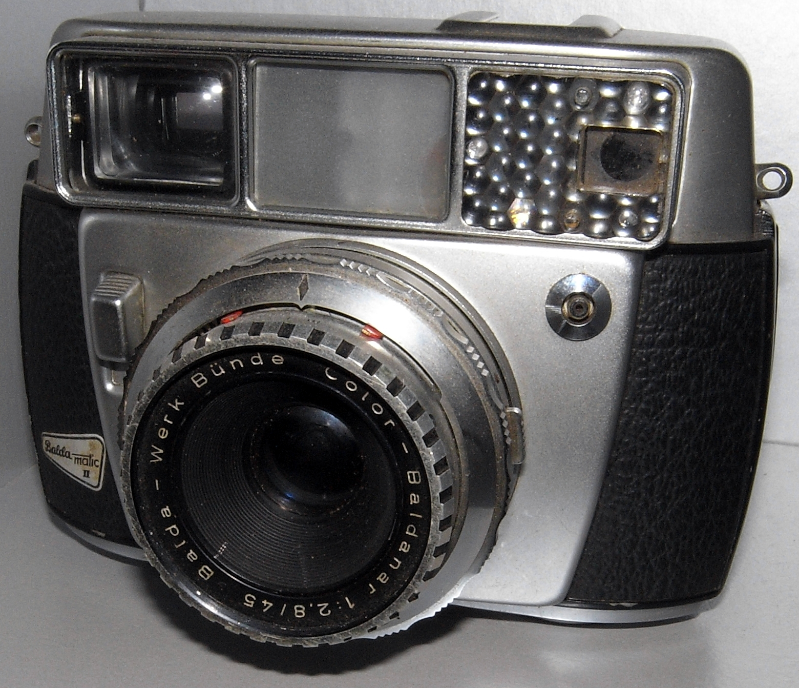 Balda Matic II mit Color-Baldanar 1:2,8 f-45mm und Prontor SLK